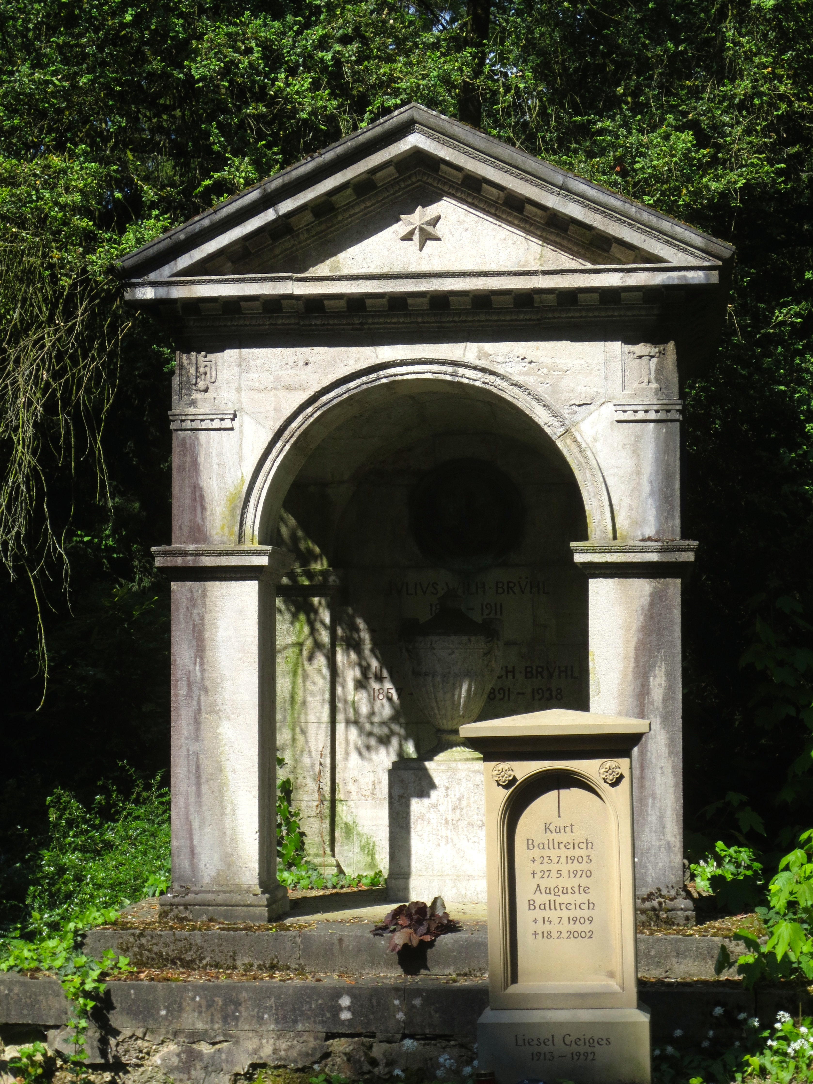 Grabmal für Julius Wilhelm Brühl, im Stil einer griechischen Tempelarchitektur, Bergfriedhof (Heidelberg)